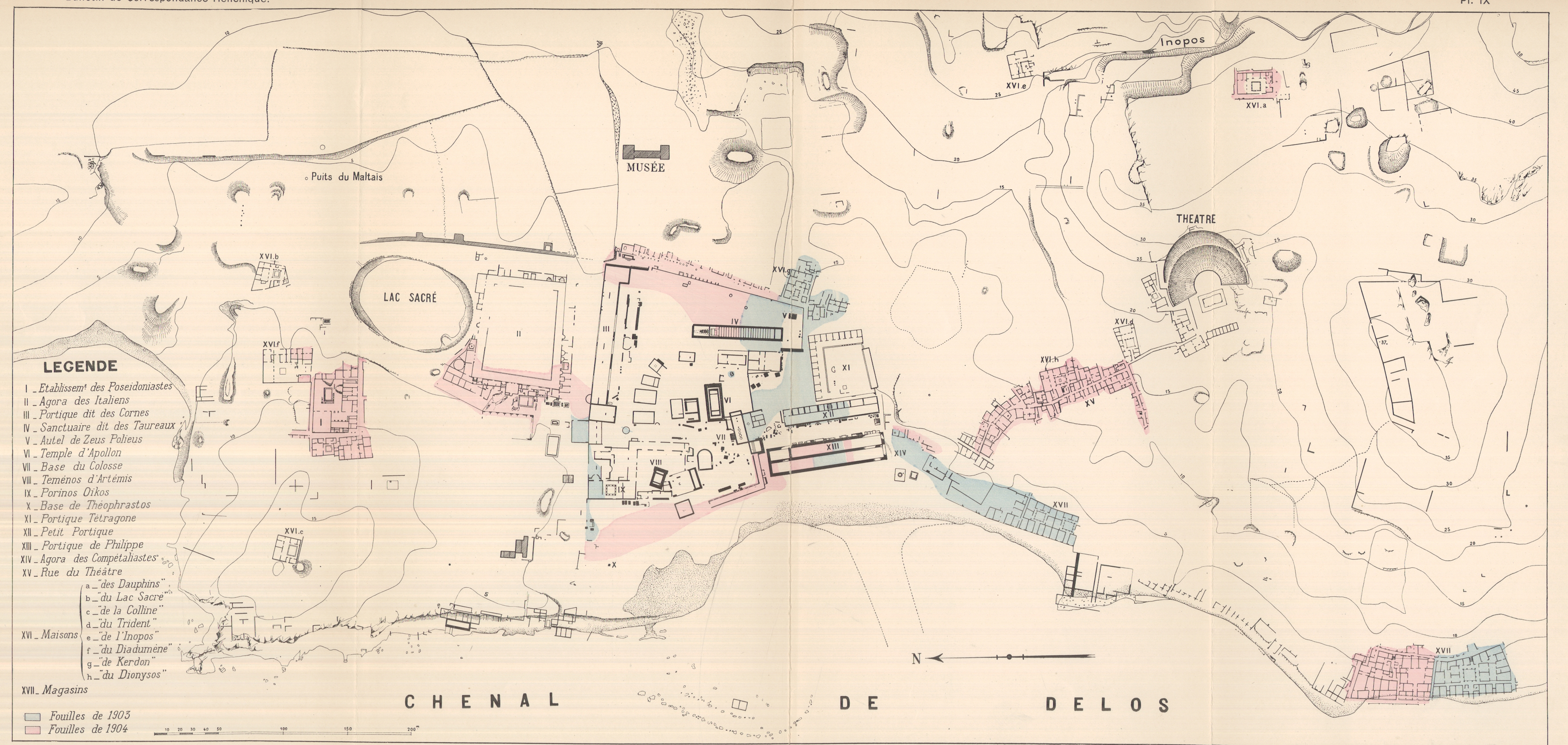 Plan des fouilles de Délos, en 1903-1904 (Bulletin de correspondance hellénique, n°30, 1906)